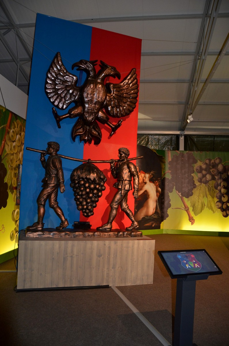 Das interaktive Stadtwappen in der Traubenhalle des Vino Versum